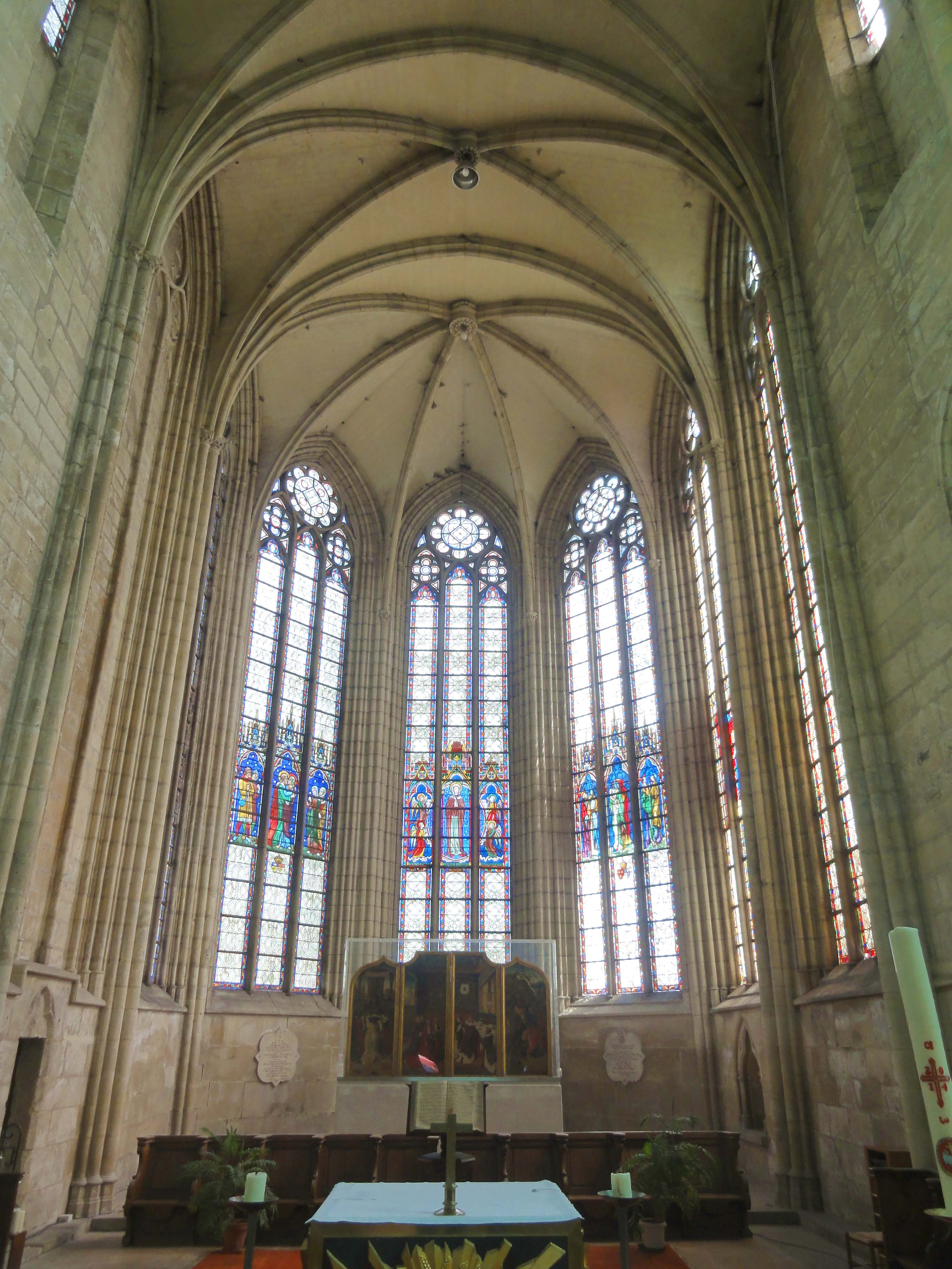 Chœur, vue vers l'est.